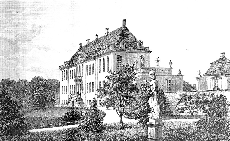 Ledreborg Slot blev bygget i 1740-45, af Lensgreve Johan Ludvig Holstein. Det ligger ved Lejre i Allerslev Sogn Voldborg Herred, Lejre Kommune (Roskilde Amt).